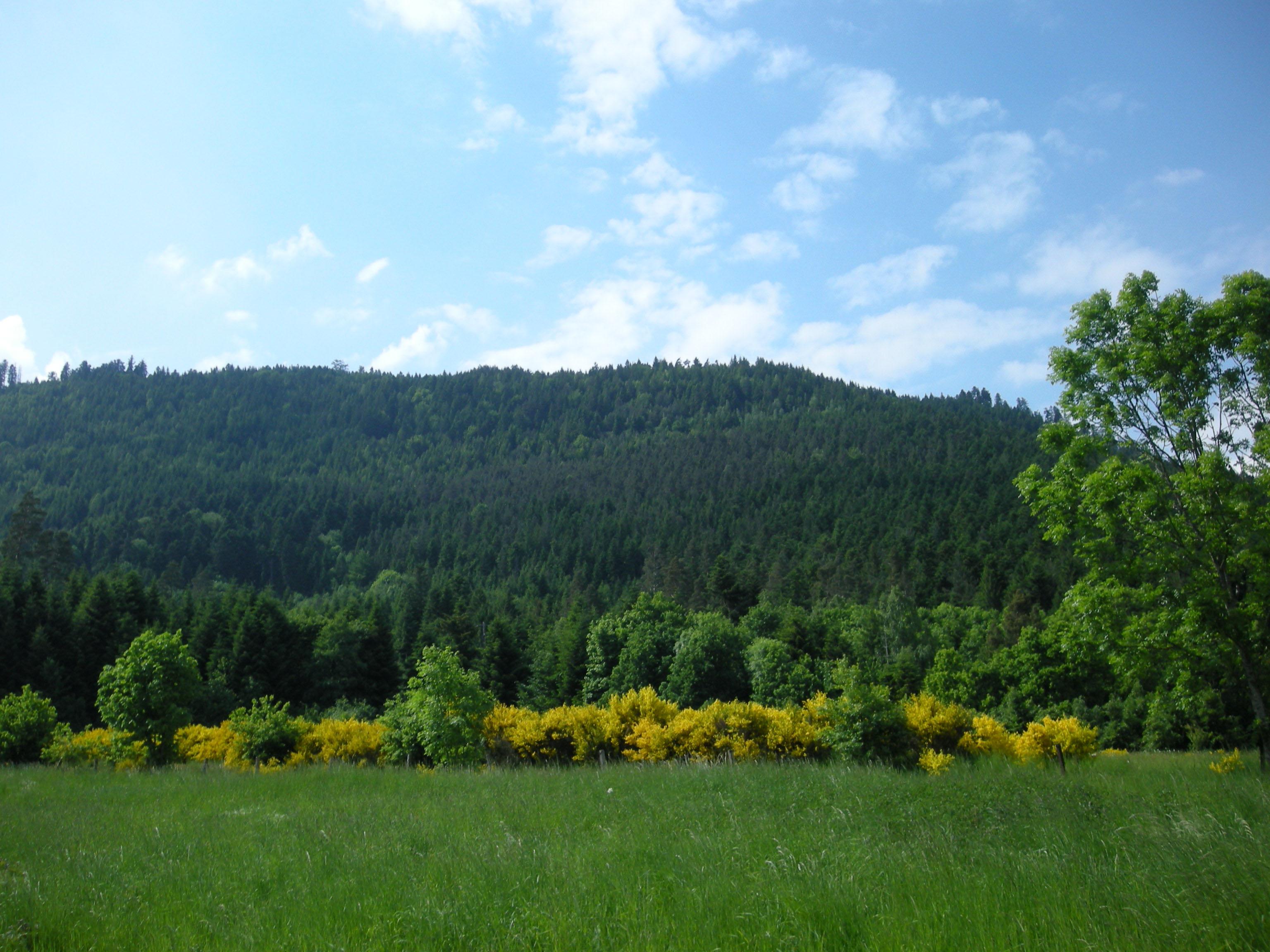 Genêts en fleurs au pied du massif du Kemberg à Saulcy-sur-Meurthe (Vosges)